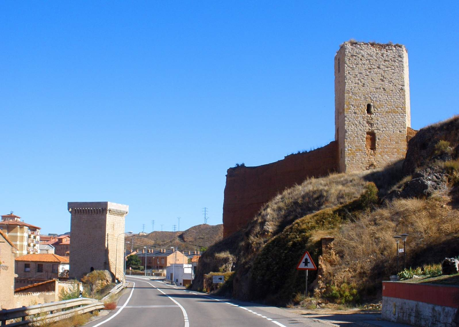 Daroca (Zaragoza) - Torre de las Cinco Esquinas